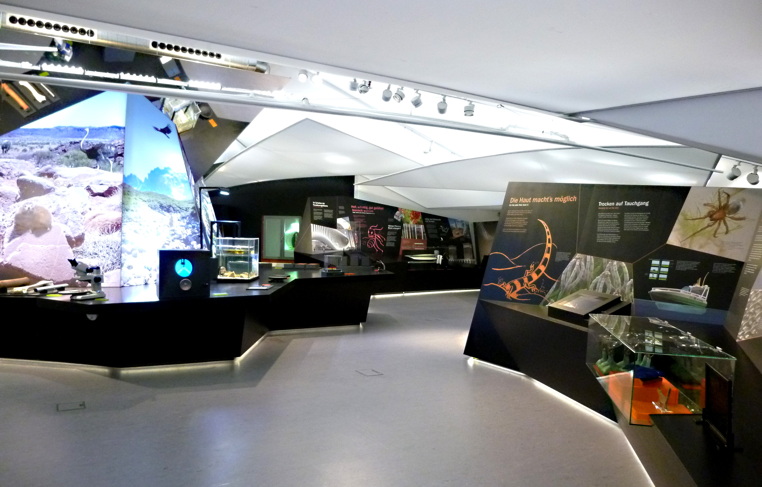 Innenansicht des Bionicums mit Blick auf die Mittelinsel